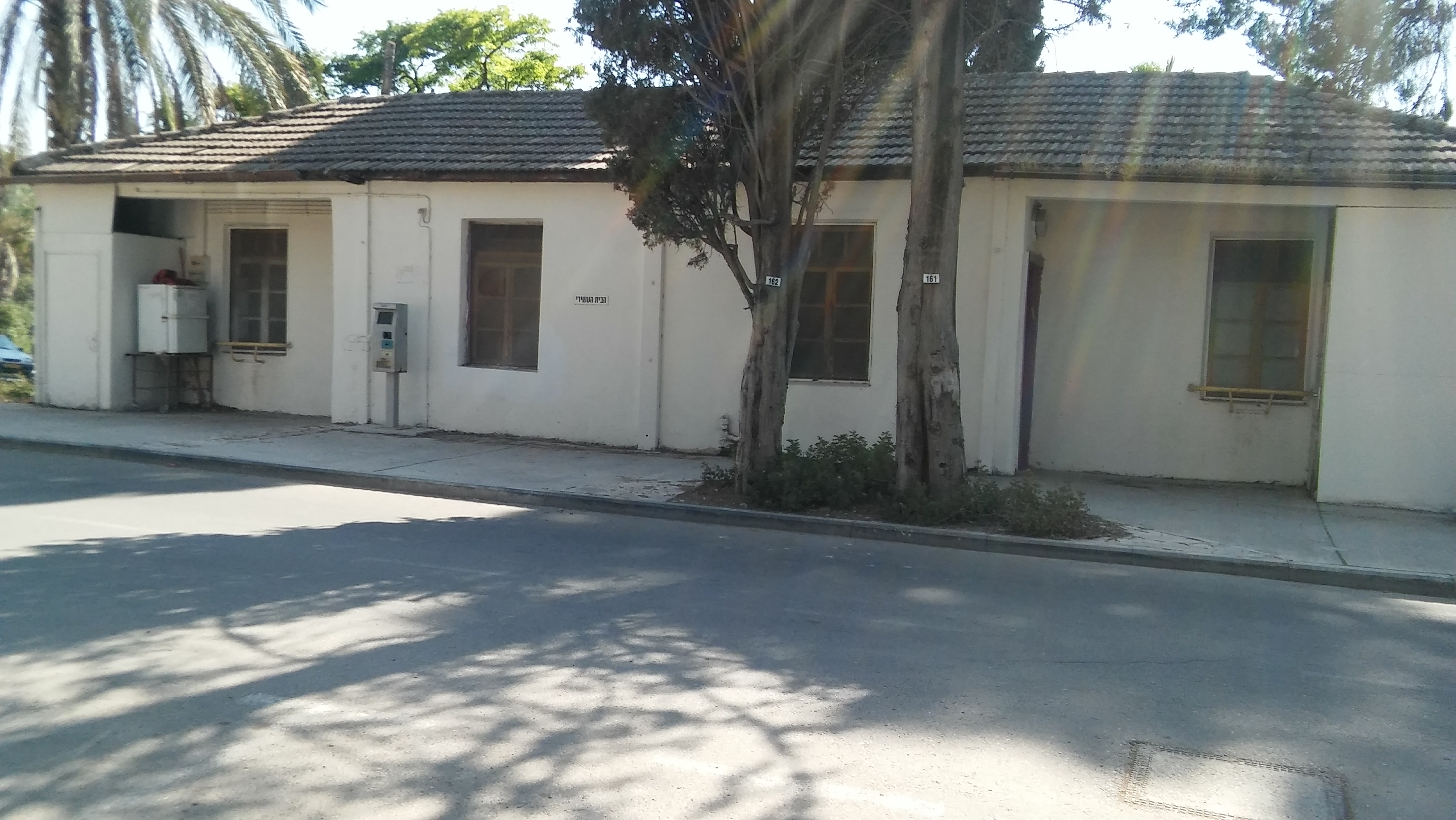 איילת השחר - מבני הפרסה - בית 10